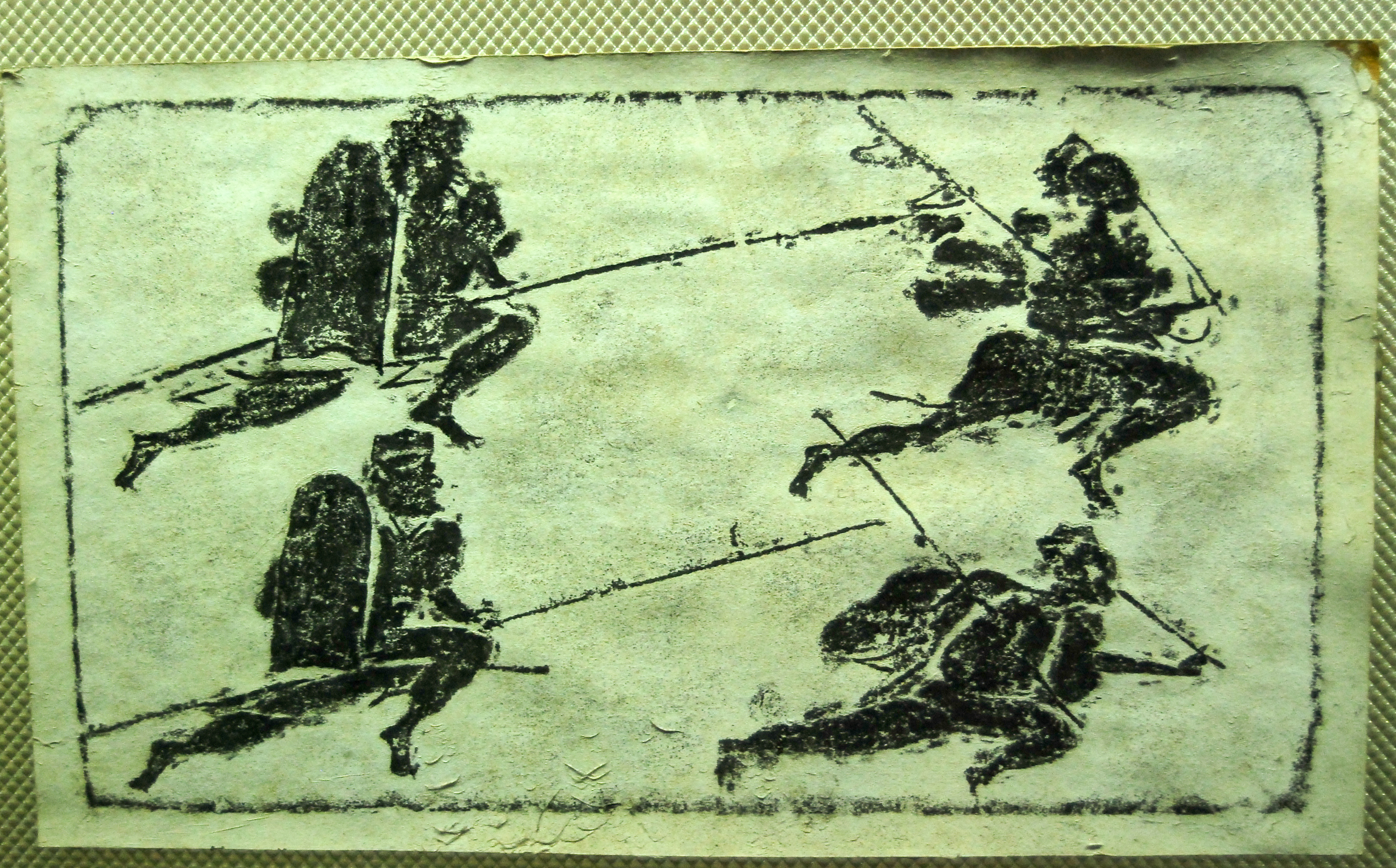 中文（中国大陆）: 东汉三国时期，伍伯画像砖，四川什邡县出土，成都武侯祠博物馆藏